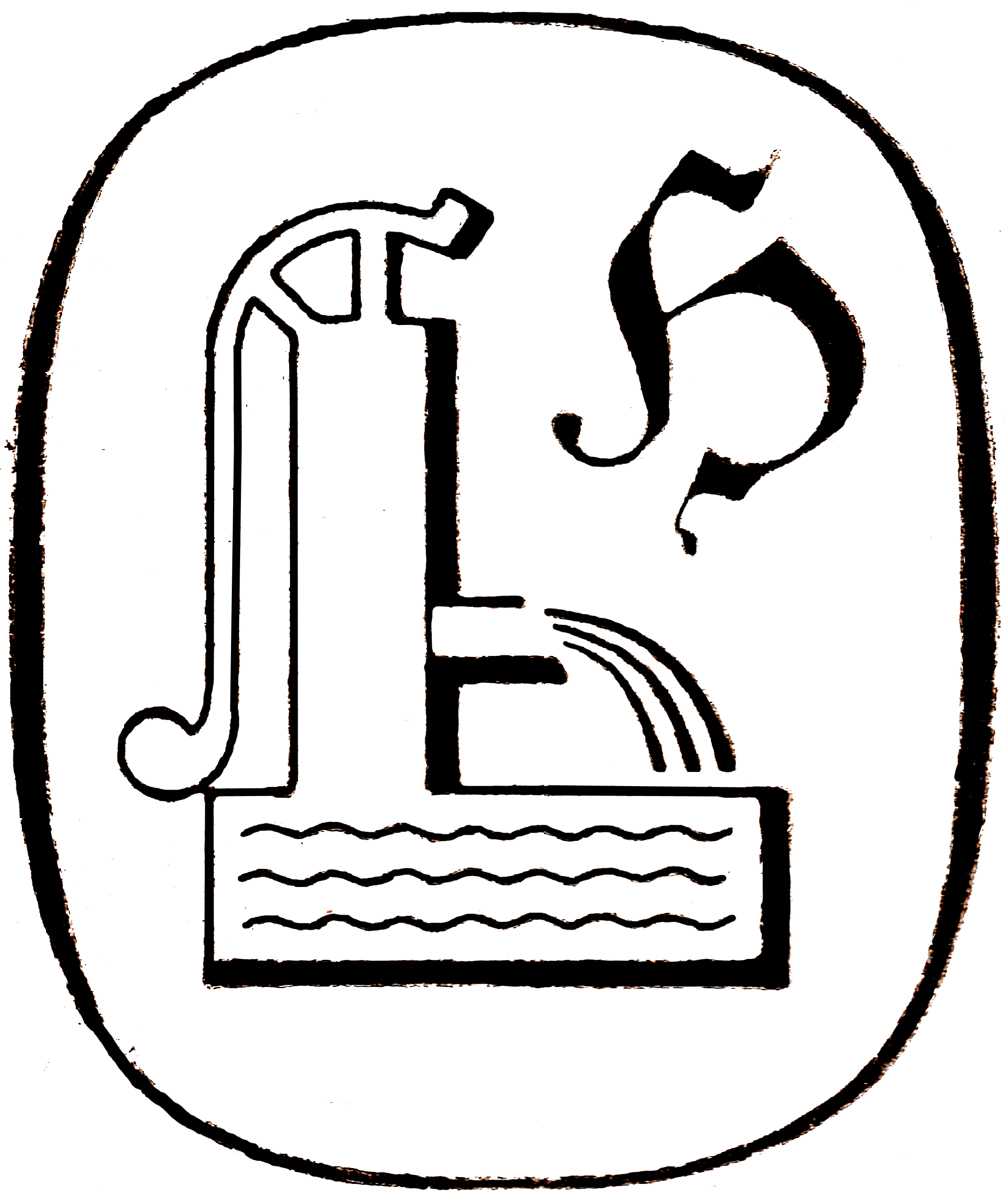 Altes Logo der Marke Brunnen, Heilbronn. Scan von einem Notizbuch aus der 1. Hälfte des 20. Jahrhunderts.